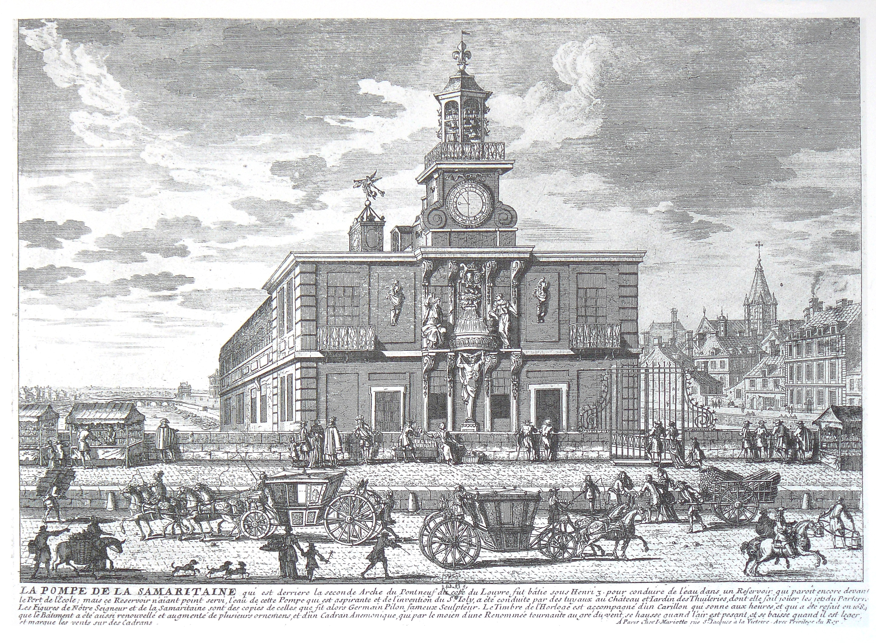 Façade du bâtiment de la pompe de la Samaritaine, sur le pont Neuf à Paris. Gravure du XVIIe siècle du Cabinet des estampes de la Bibliothèque Nationale (Paris) reproduite dans le livre Au fil de l'eau, au fil du temps... 1989, Syndicat des eaux d'Île-de-France.